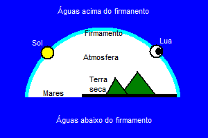 O firmamento segundo a cosmologia bíblica